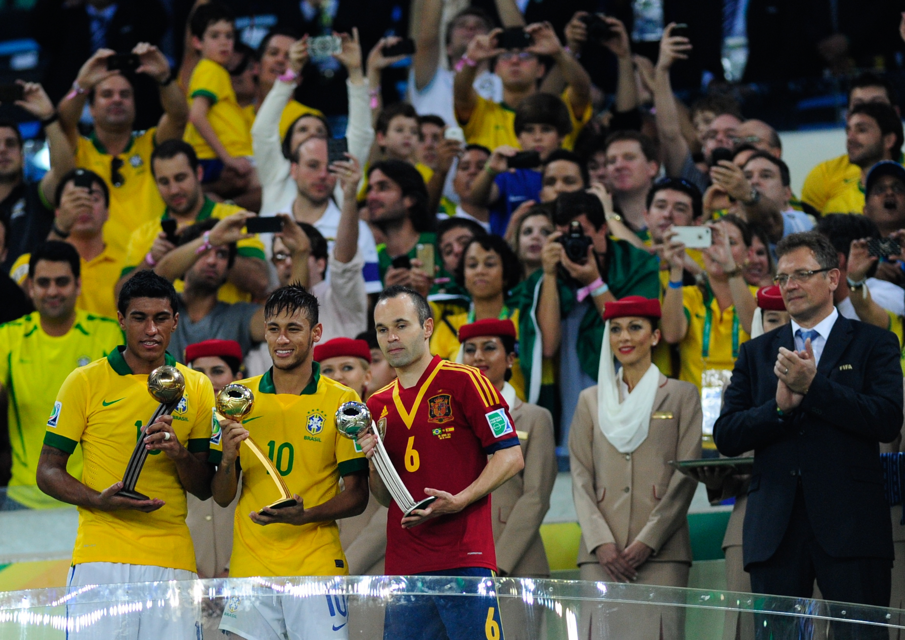 No Estádio do Maracanã, Brasil e Espanha disputam a taça da Copa das Confederações de 2013.